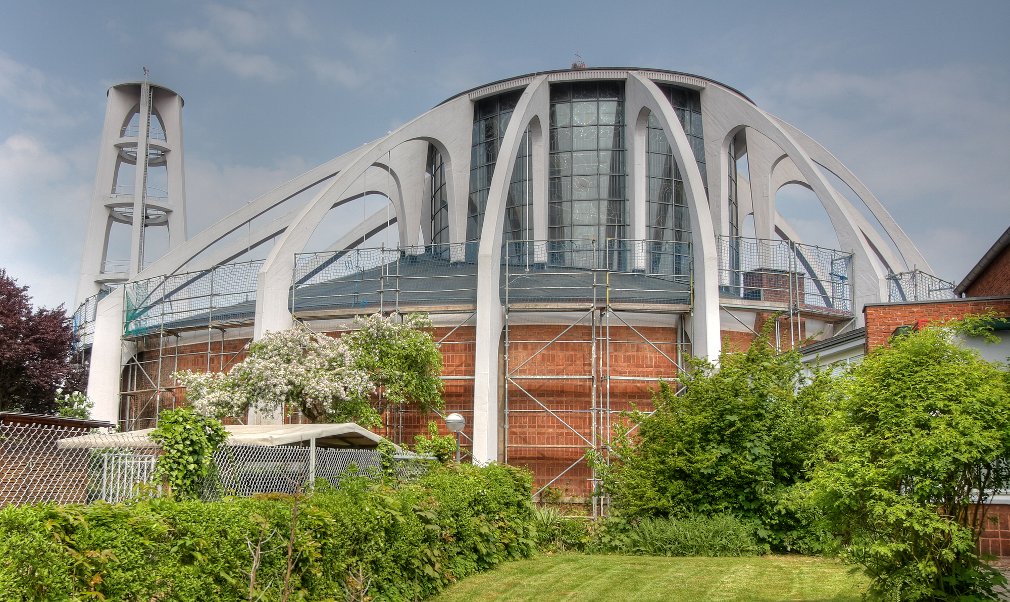 Pfarrkirche St. Albert, Saarbrücken-Rodenhof, Architekt: Gottfried Böhm